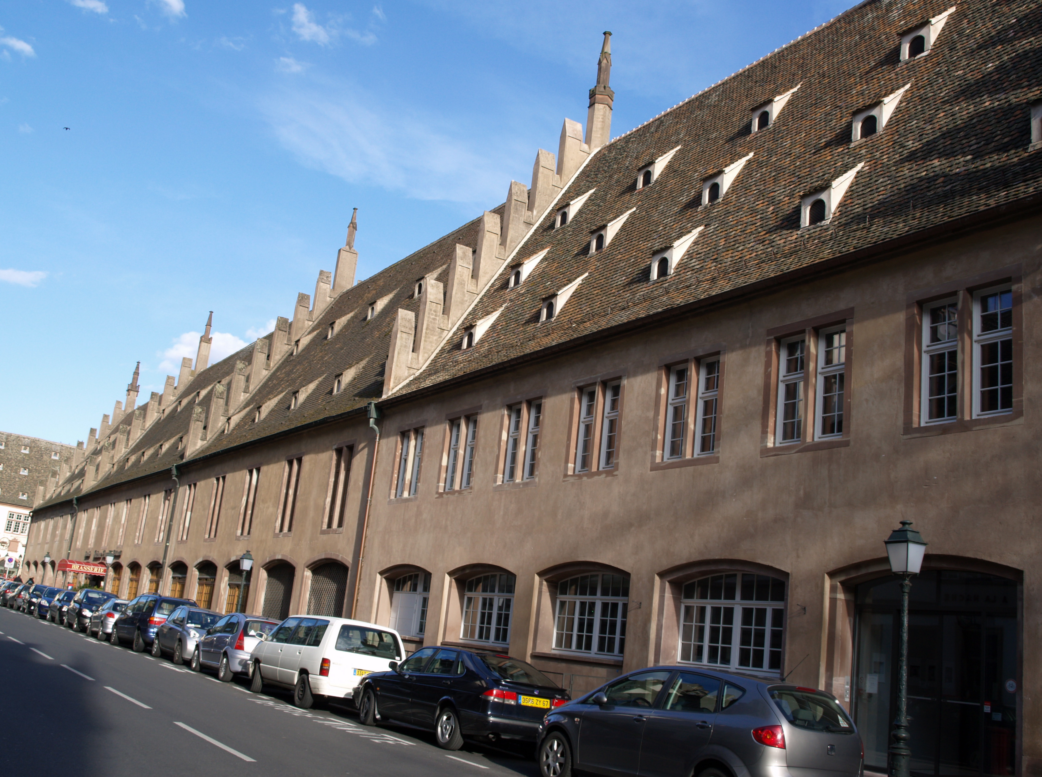 L'Ancienne Douane de Strasbourg, côté centre ville